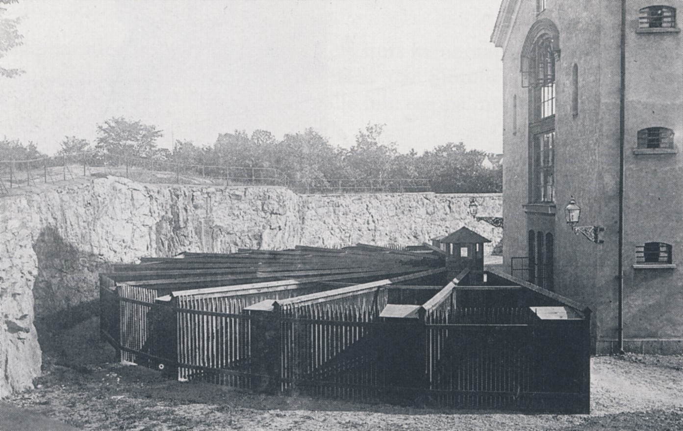 Rastgården på Långholmens centralfängelse